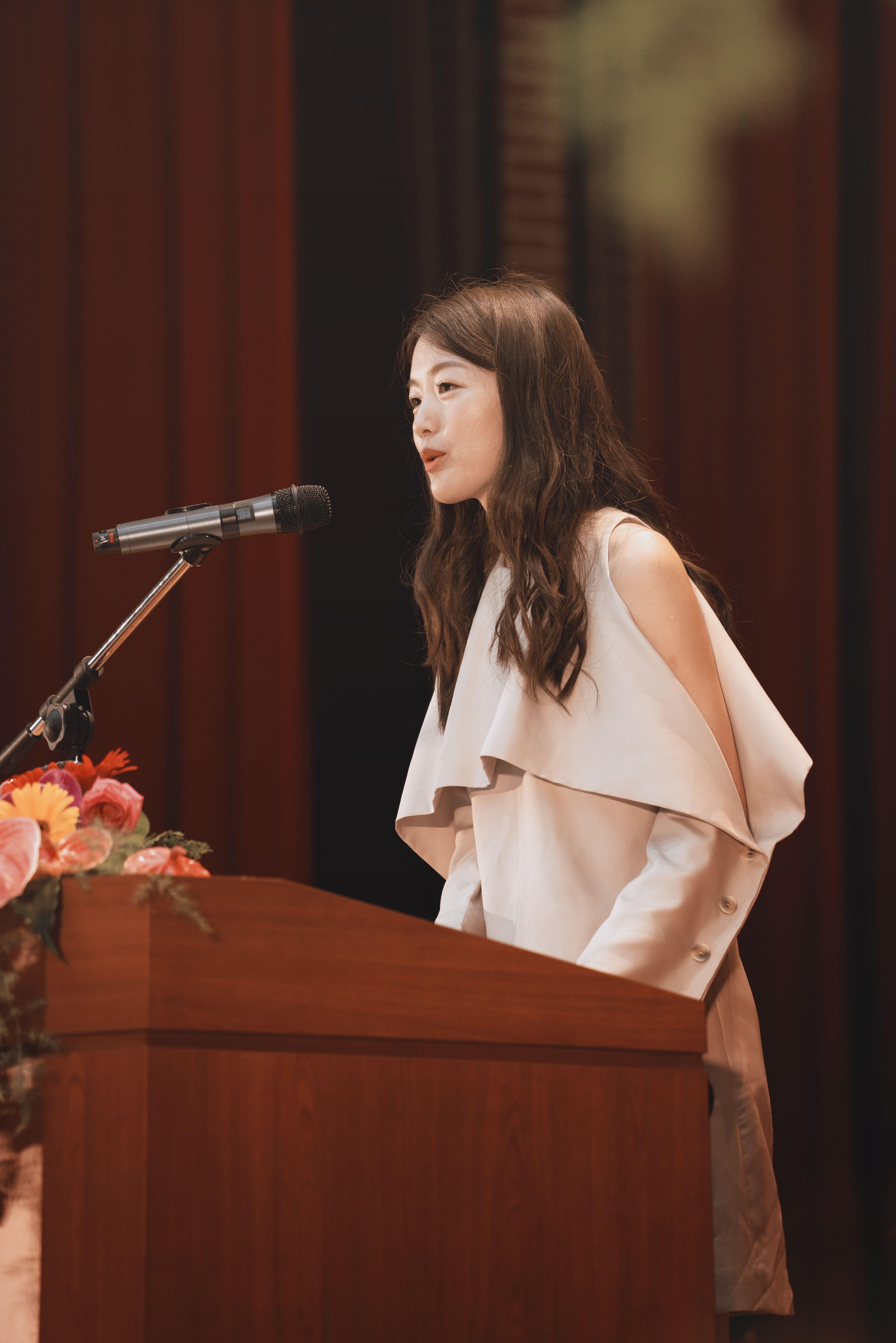 江孟芝2019年國立台灣師範大學畢業演說